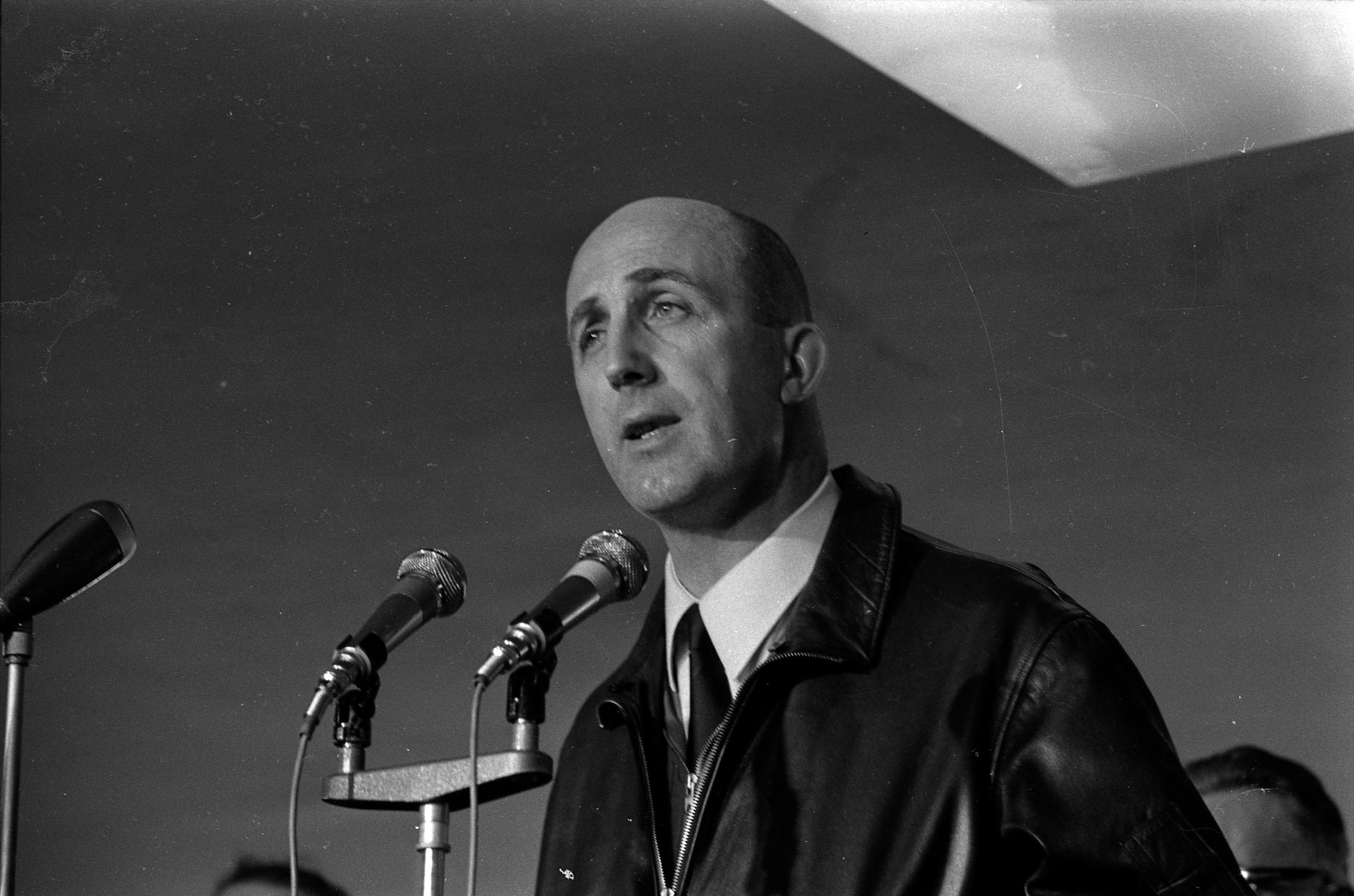 Hall de l'Aérogare Blagnac 1. 2 mars 1969. Plan rapproché de 3/4 face d'André Turcat (directeur des essais en vol de Sud Aviation et pilote du 1er vol d'essai du Concorde) pendant son discours, micros. Cliché pris pendant la conférence de presse organisée lors du 1er vol d'essai du Concorde.